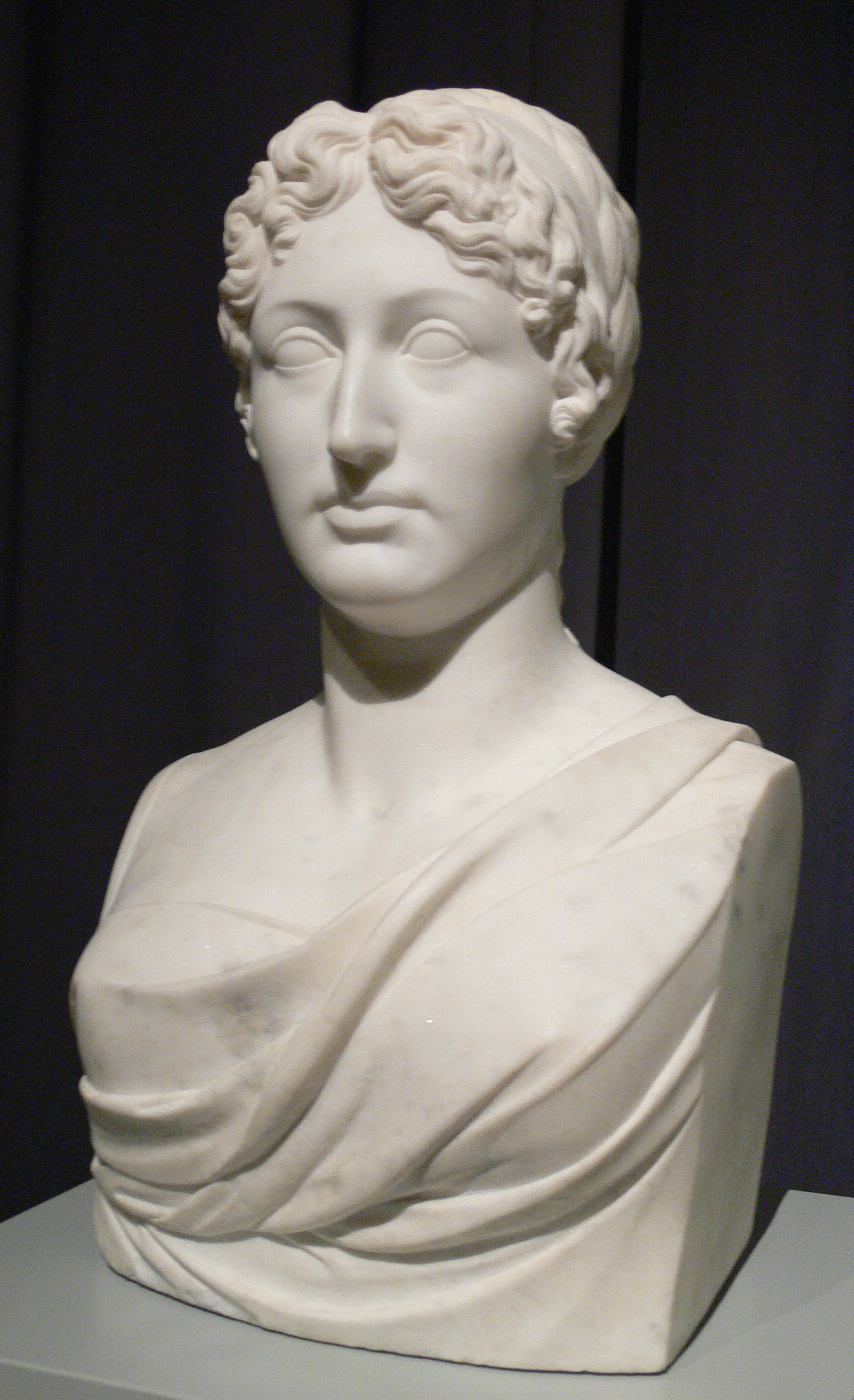 Büste Ernestine Gräfin von Montgelas, München 1822, Marmor Bayerisches Nationalmuseum München